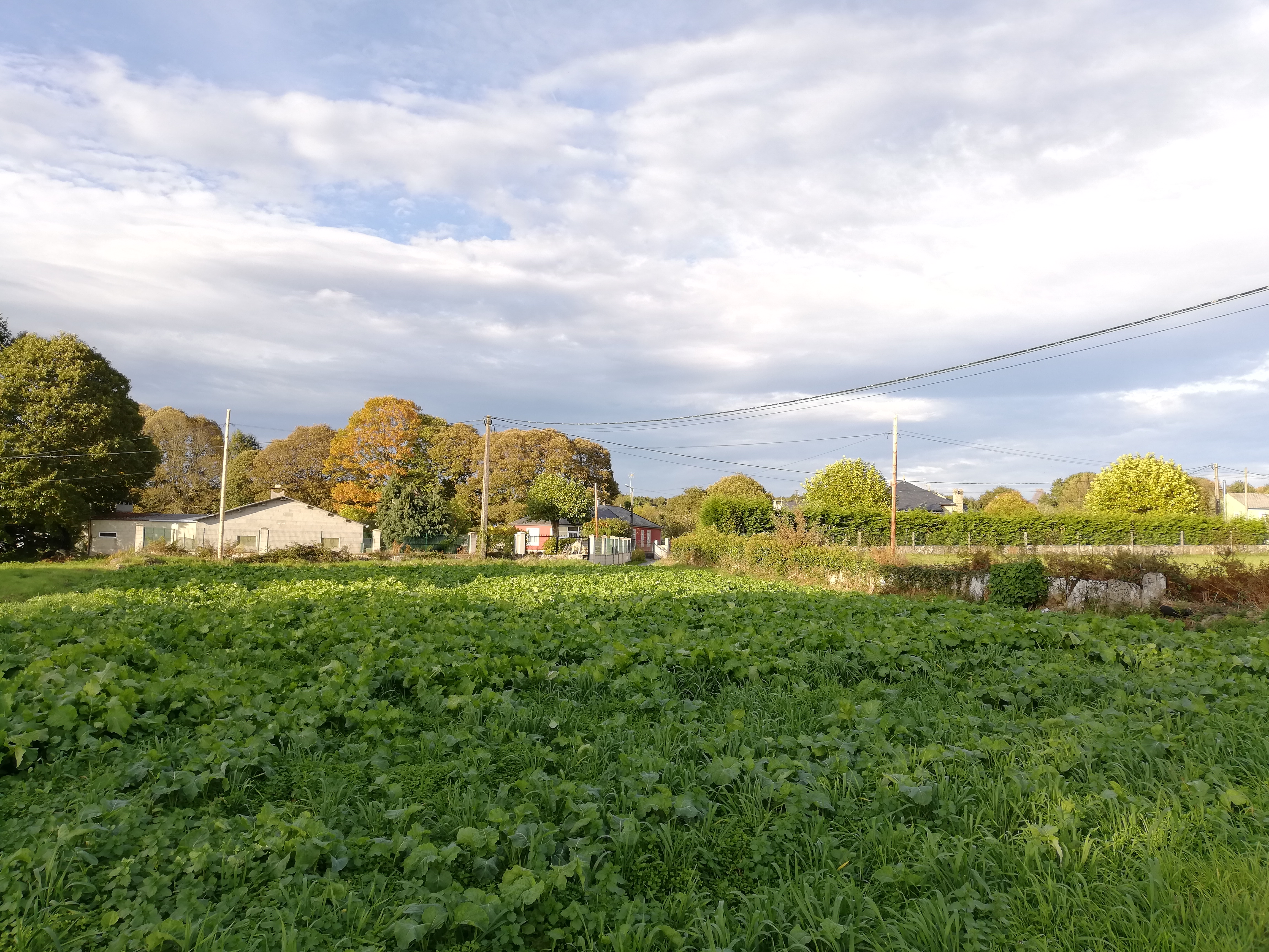 Vista do lugar de Vilate, na parroquia de San Martiño de Lanzós, Vilalba.